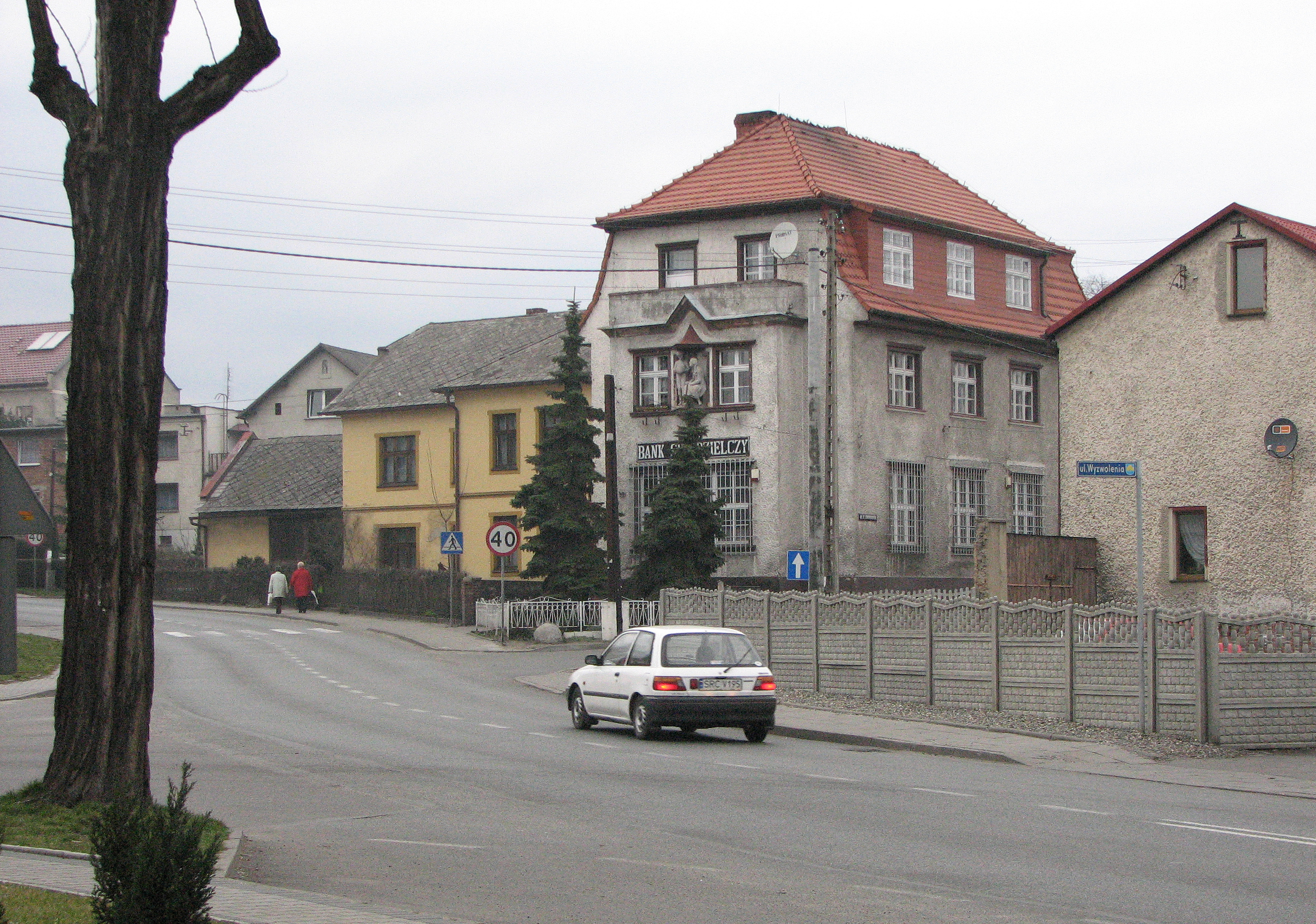 Pietrowice Wielkie, Polska, Poland